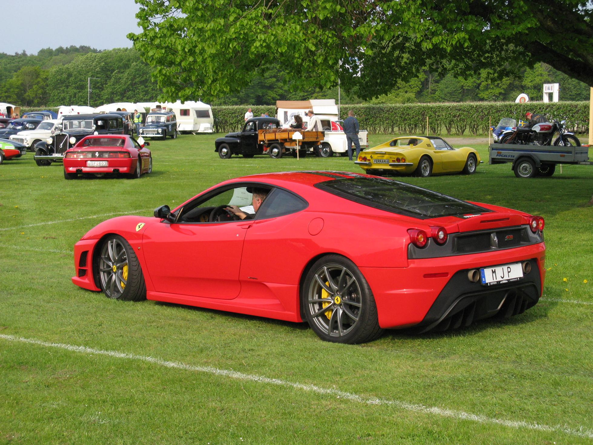 Ferrari F430 Scuderia